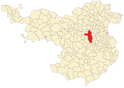 Situación de Vilademuls en la provincia de Gerona.